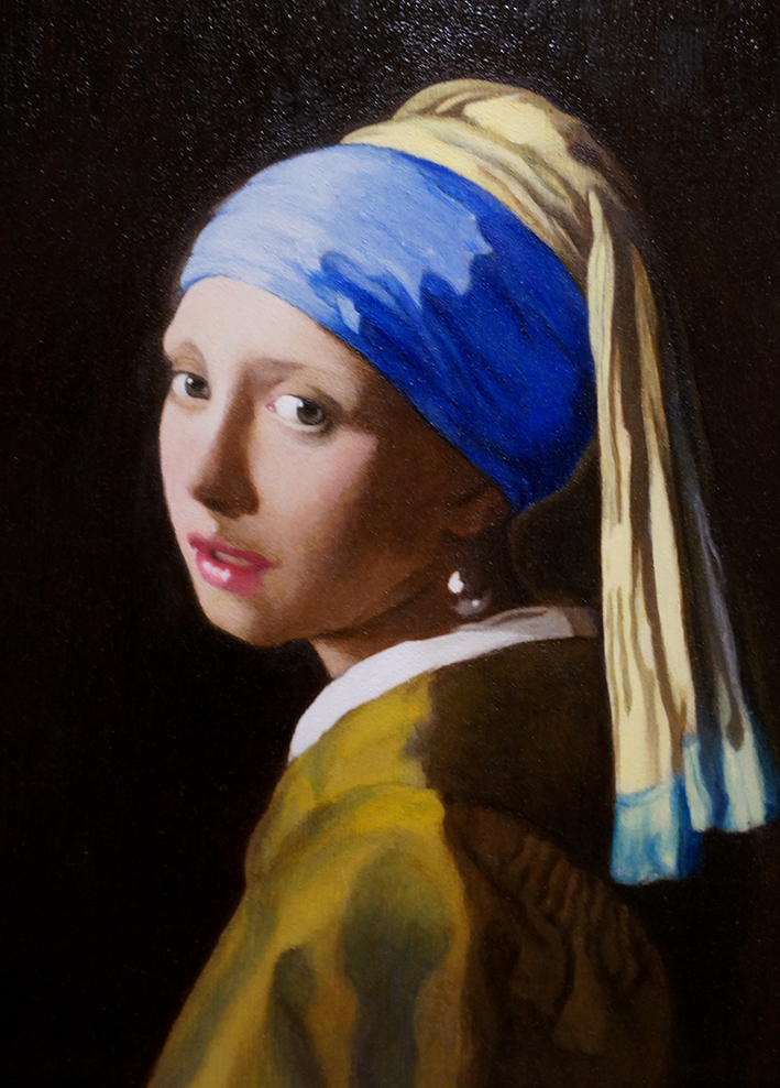 「青いターバンの少女」の模写作品